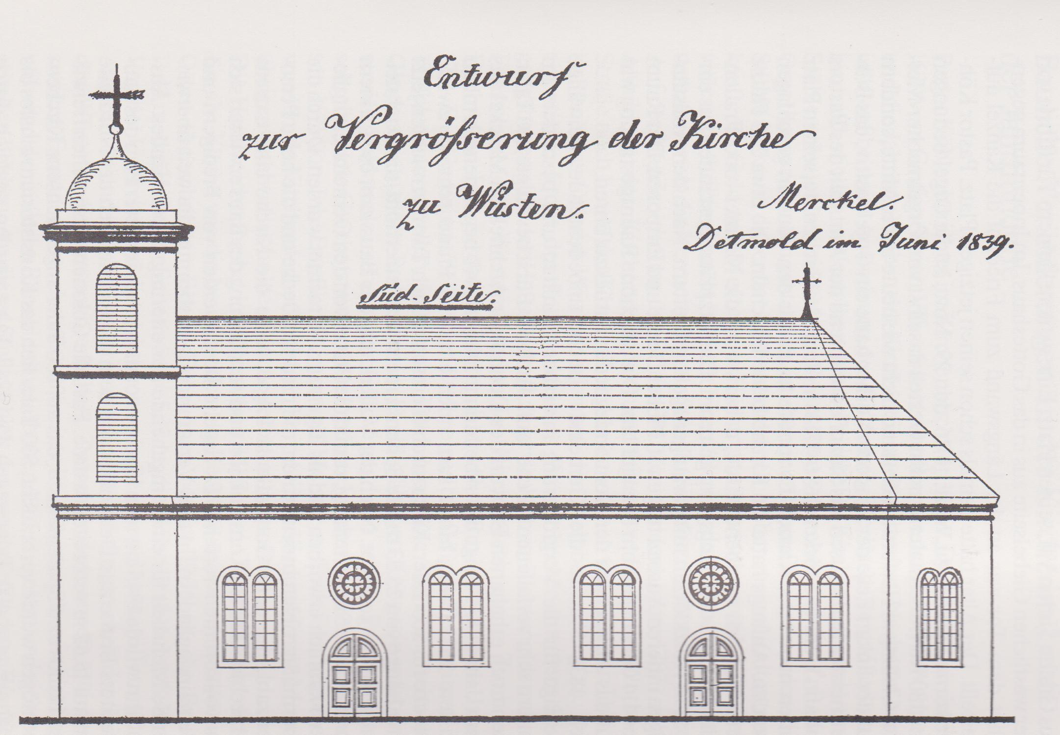 Deutschland - Nordrhein-Westfalen - Kreis Lippe - Bad Salzuflen - Wüsten: Ev. Kirche, Entwurf von Ferdinand Ludwig August Merckel (Detmold) zur Vergrößerung vom Juni 1839 (südliche Seite)